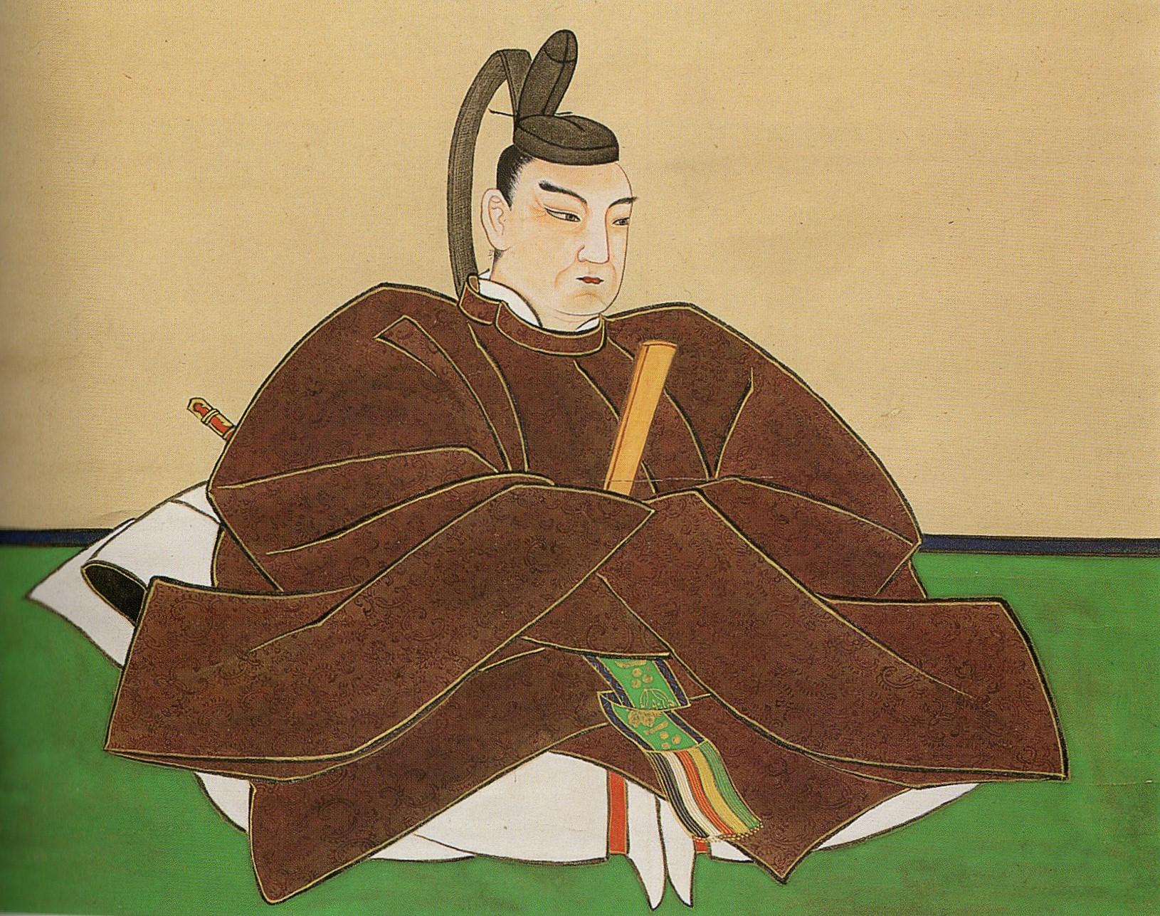 徳山藩六代藩主・毛利広寛の肖像画。